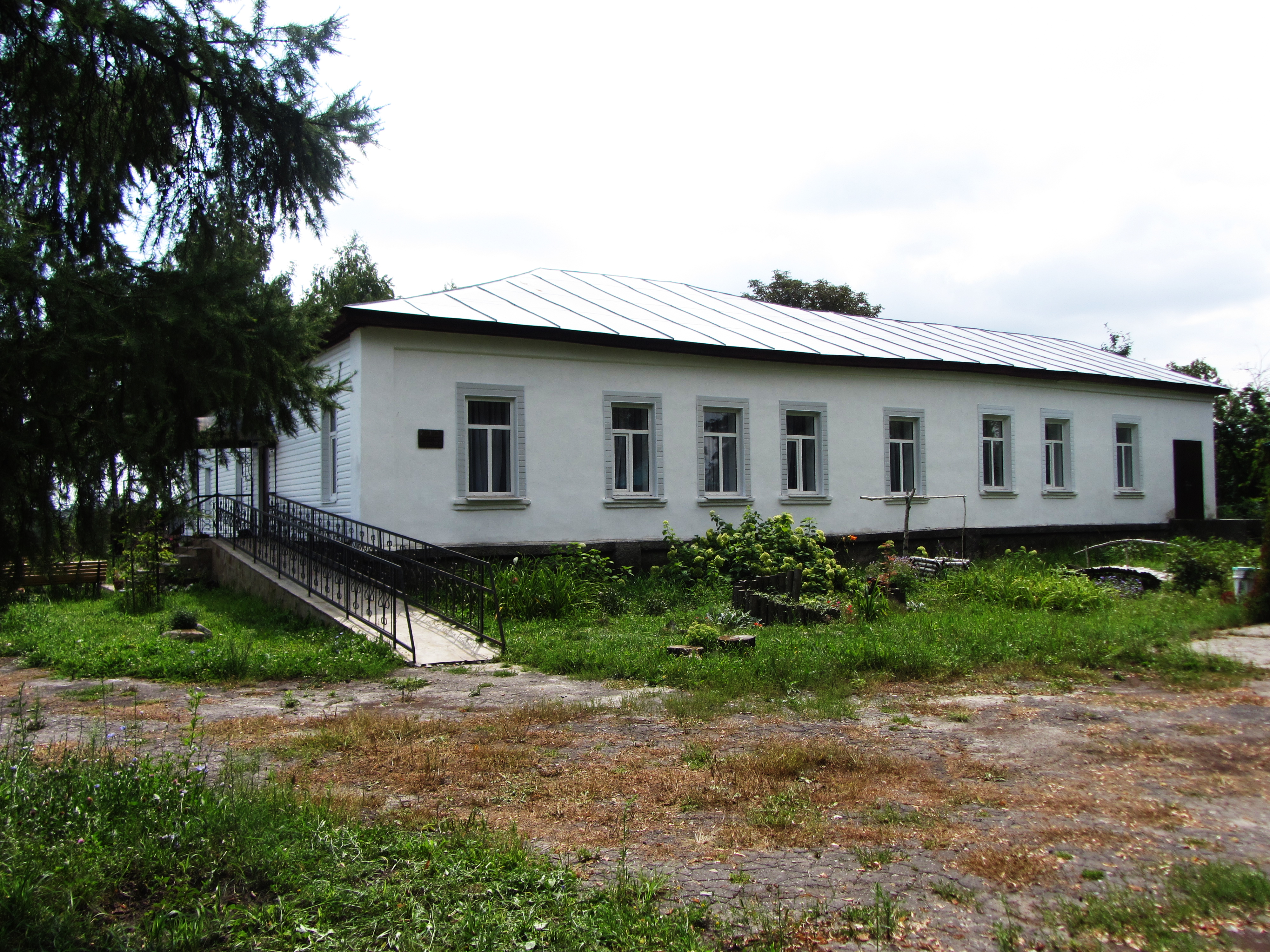 Садибний будинок Огієвських, в якому перебував Шевченко Т.Г., Кролевецький район, м. Кролевець, вул. Шевченка, 33